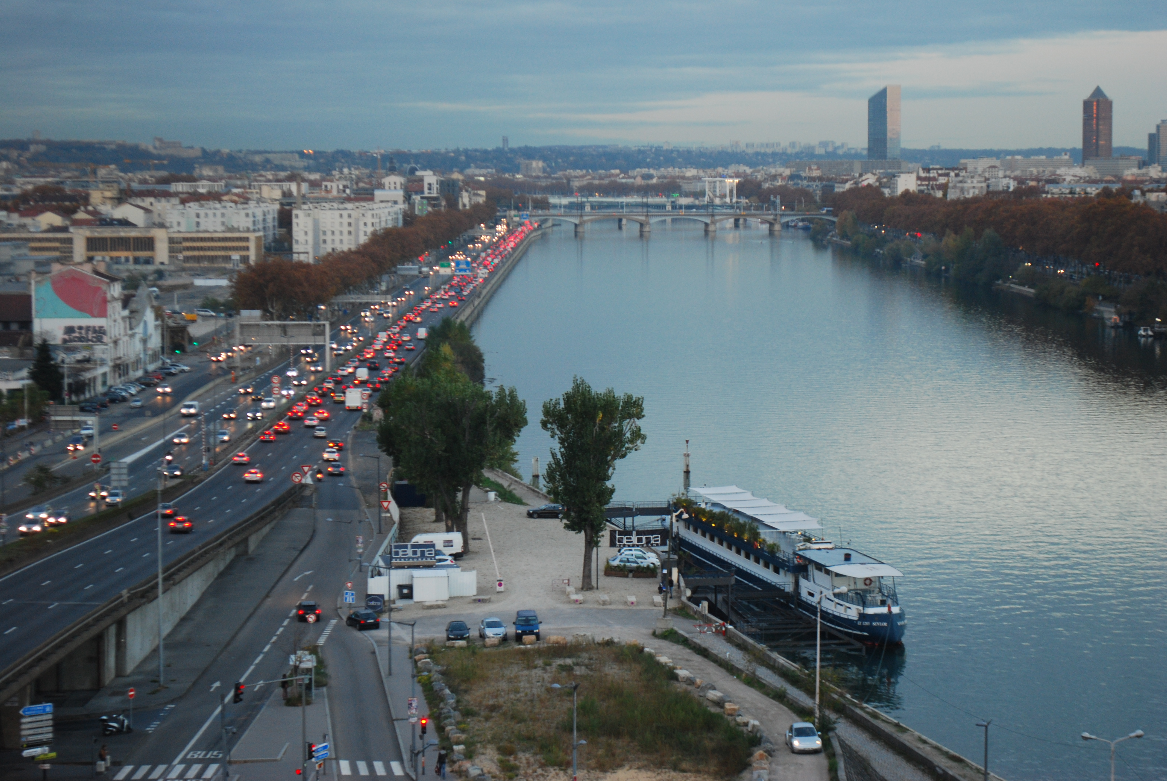 Vue du quartier de la Confluence à Lyon. A7 est limitée en 2013 septembre à 70 km/h et 2011 janvier 90 km/h).